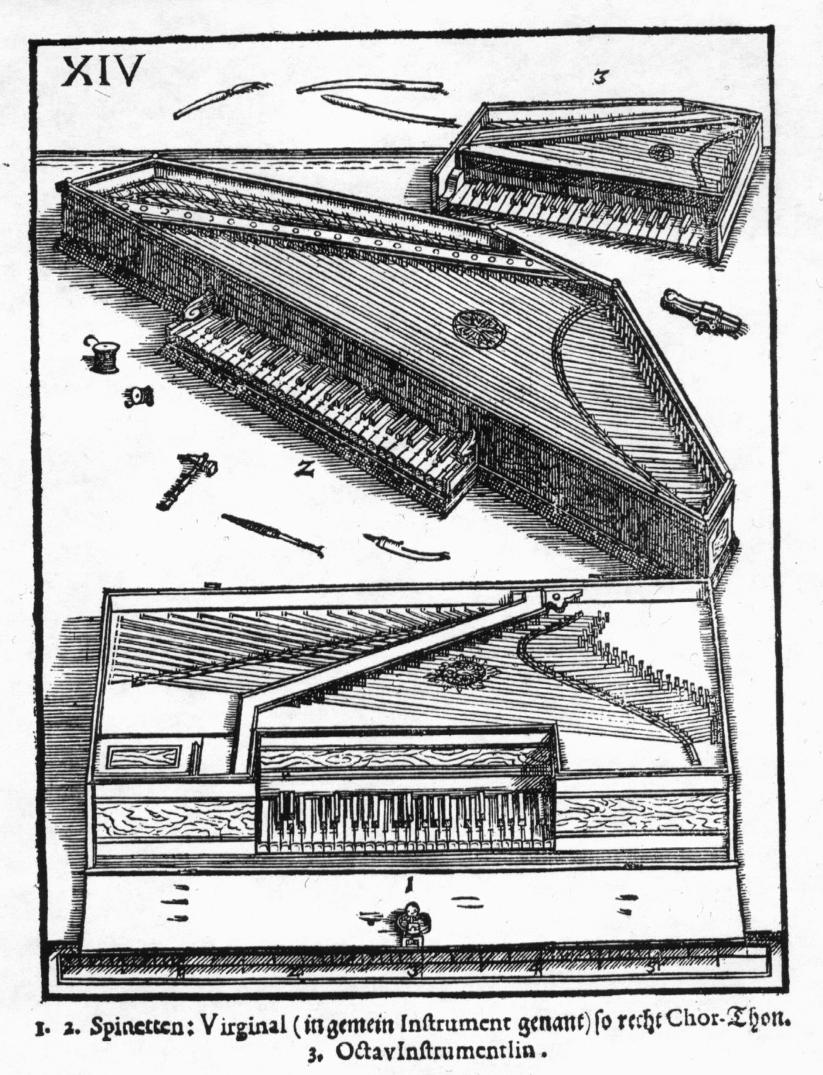 Syntagma Musicum Theatrum Instrumentorum seu Sciagraphia Wolfenbüttel 1620